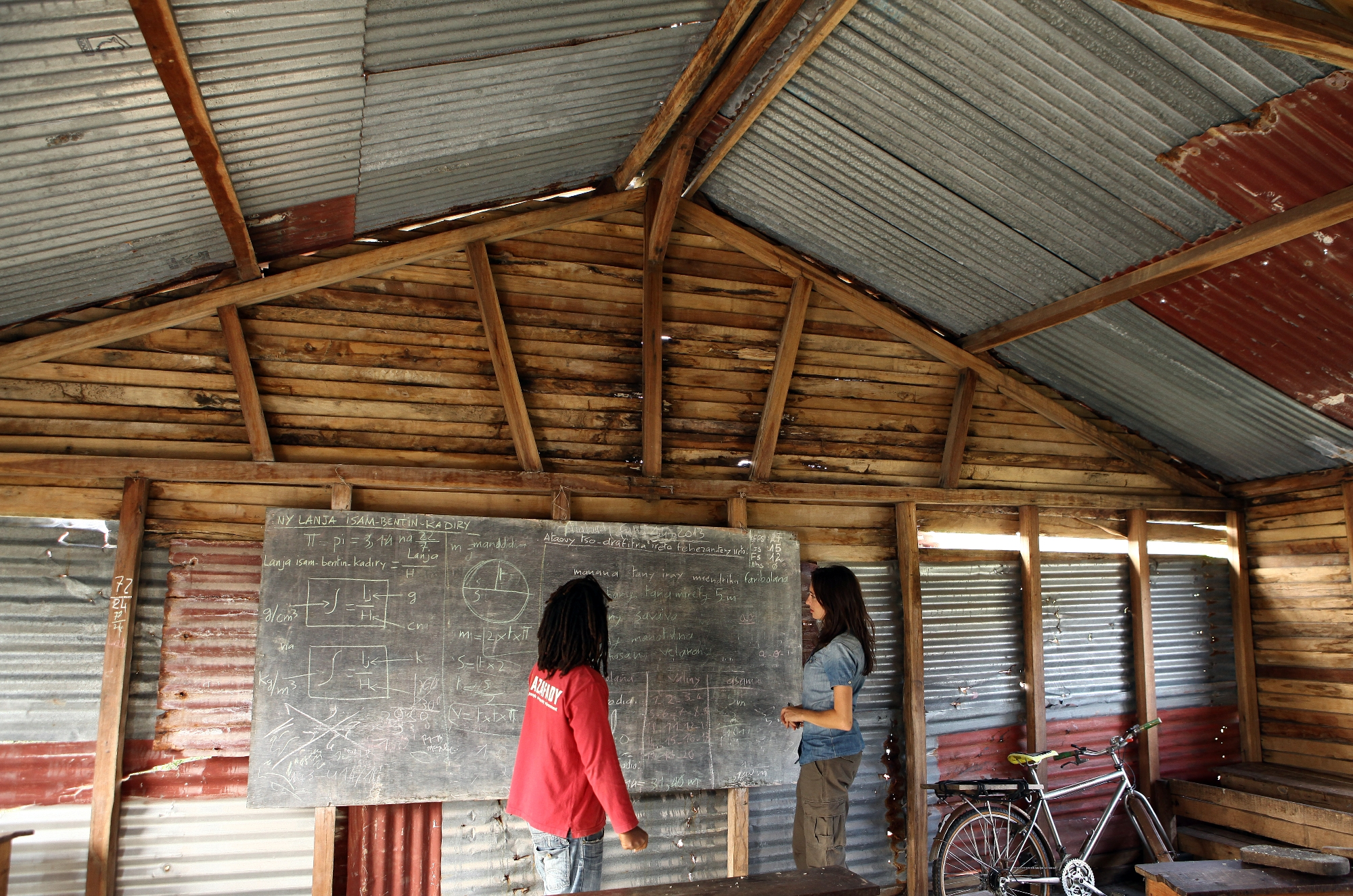 Kulczyk Foundation pomogło wyremontować szkołę na Madagaskarze_fot. Tatiana Jachyra